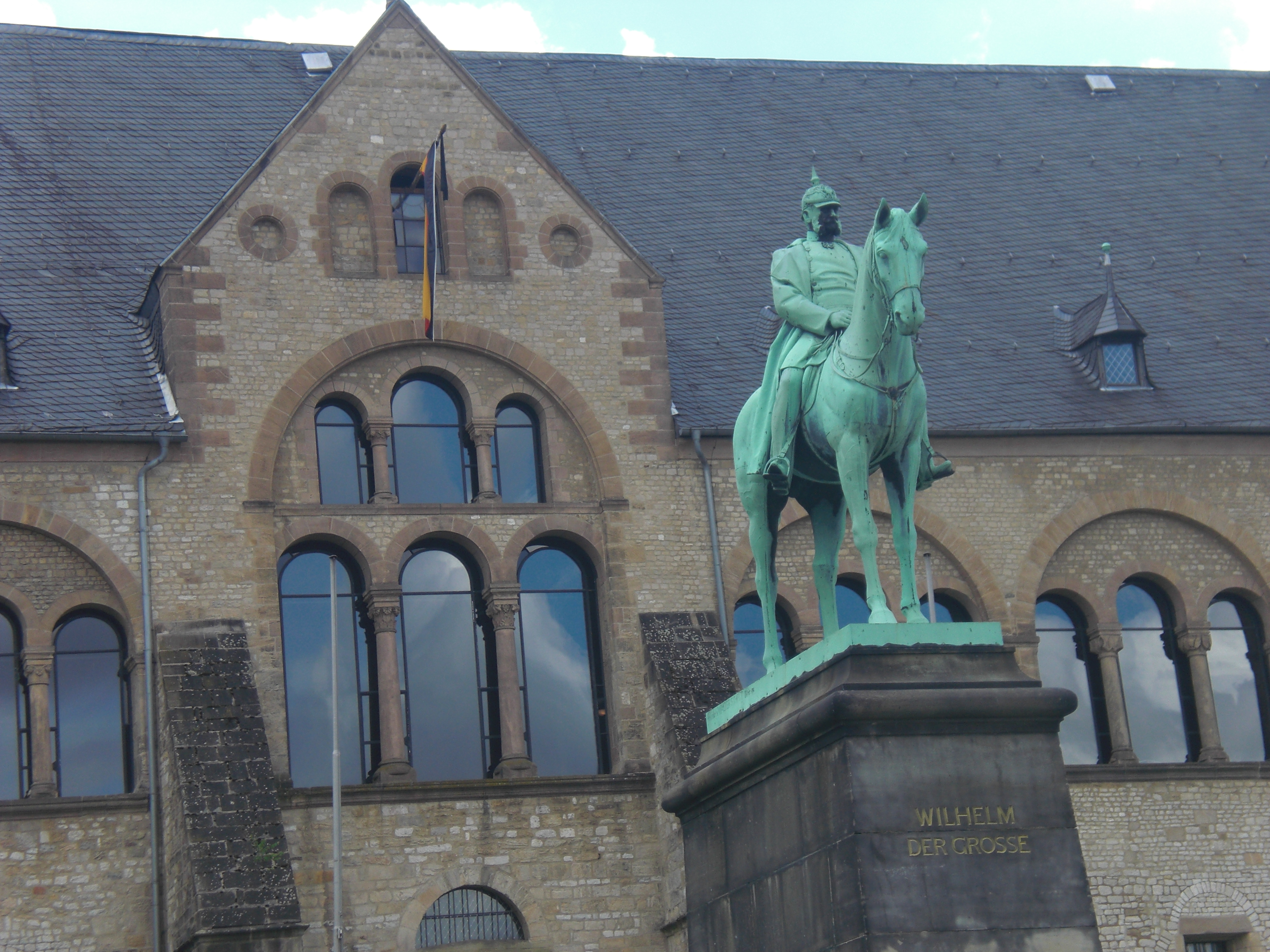 Monumento en Goslar